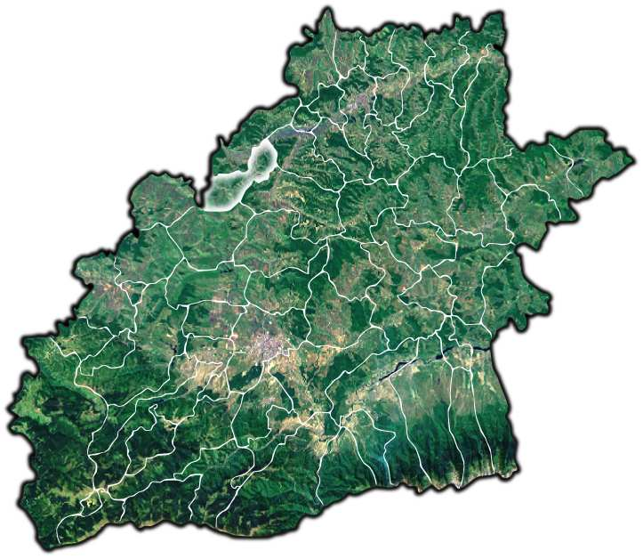 Seica Mica jud Sibiu